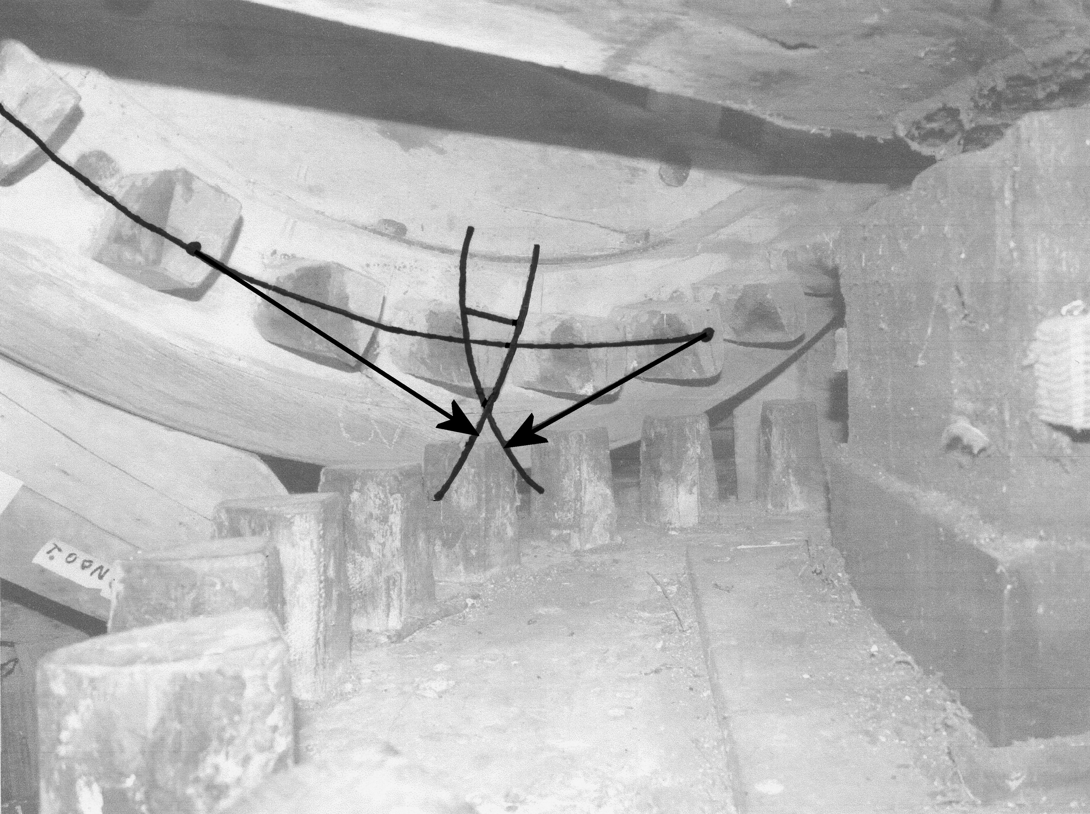 Kopvorm kam bovenwiel